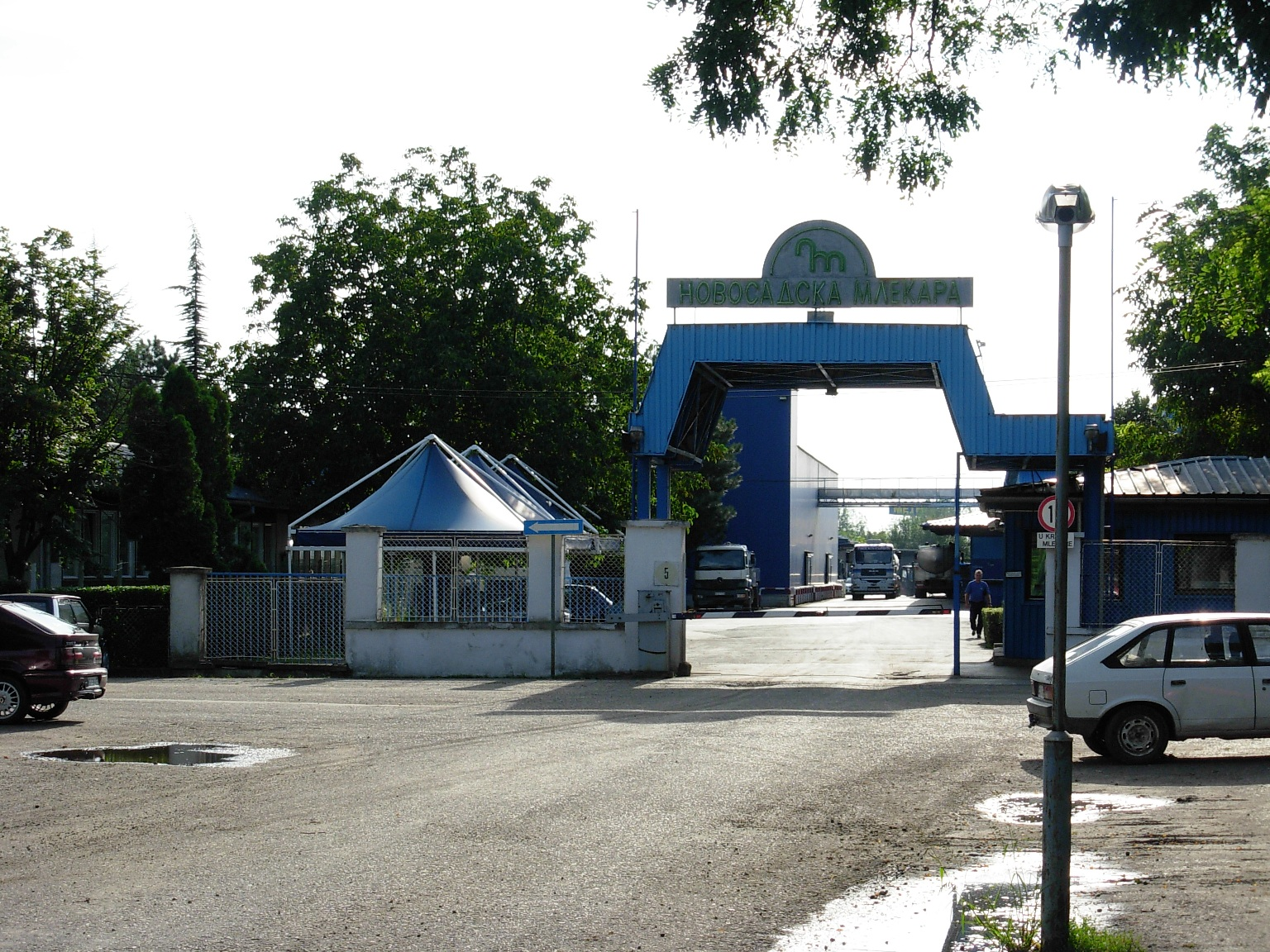 Ulaz u Novosadsku mlekaru.